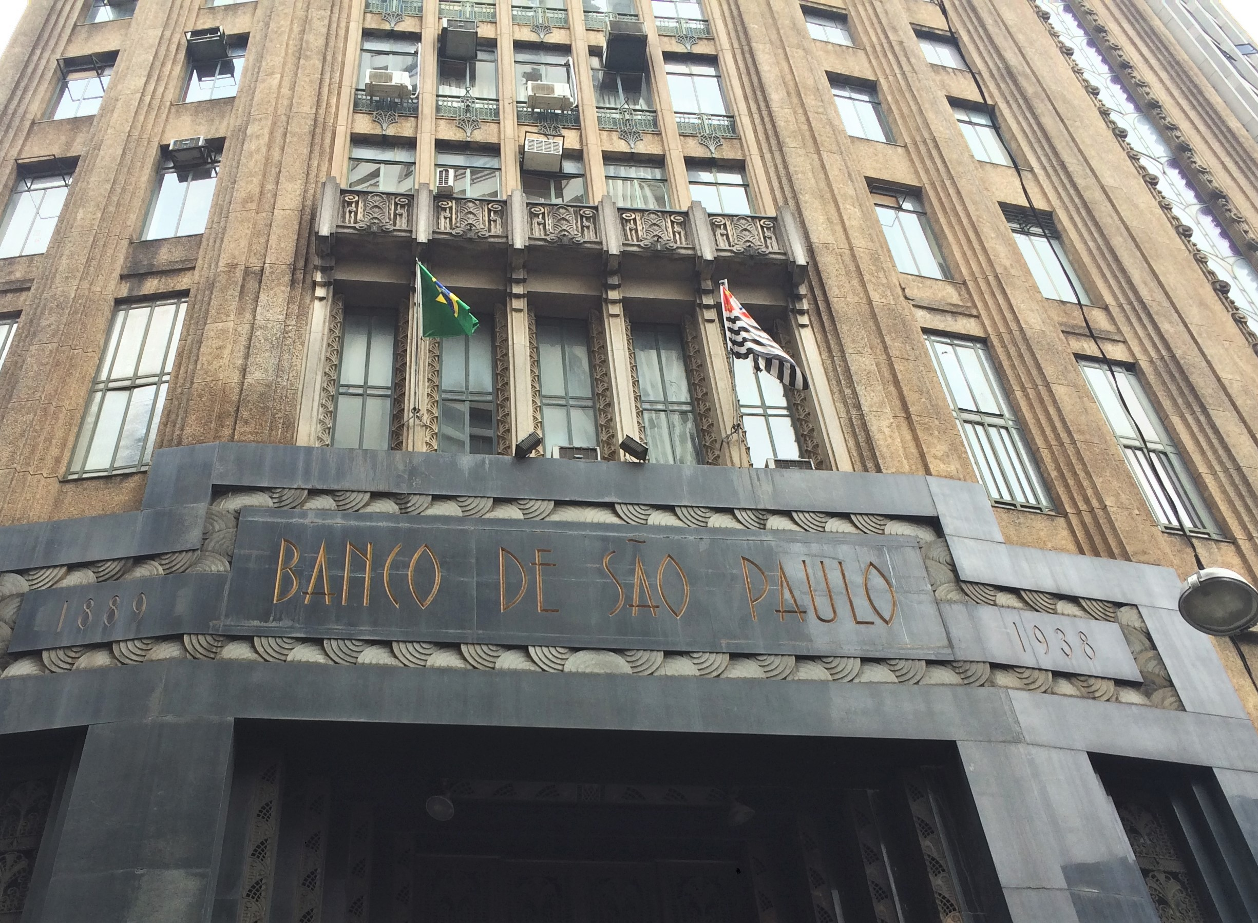 Vista aproximada da fachada do prédio, das bandeiras do Brasil e do Estado de São Paulo e das janelas dos primeiros andares do edifício